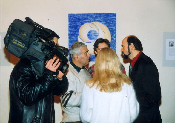 Выставка Игоря шинкара